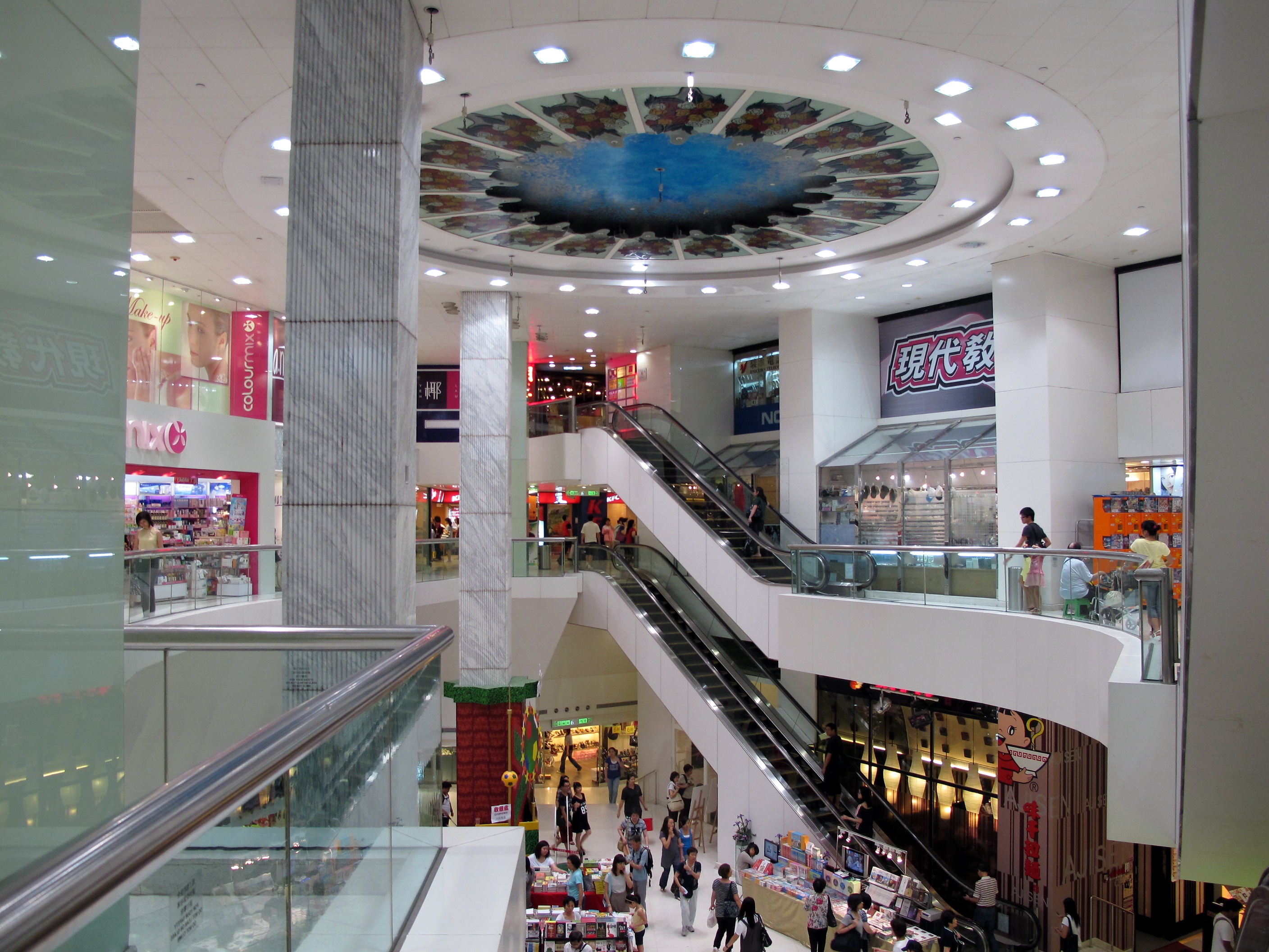 New Jade Garden Shopping Arcade 新翠商場